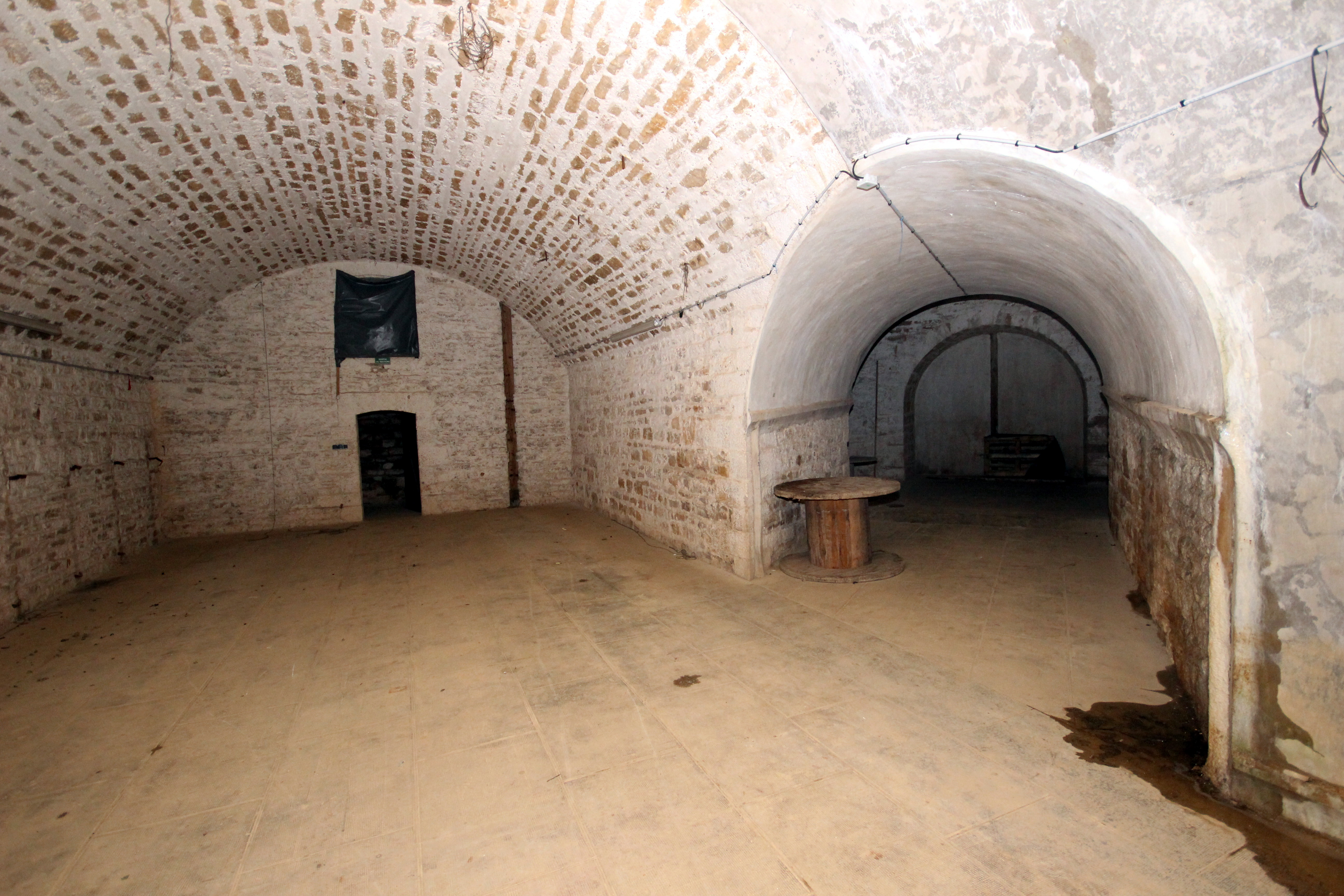 Un magasin d'artillerie du fort de Cognelot